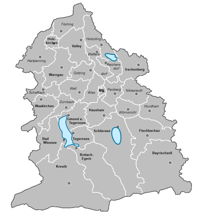 Die Gemeinden im Landkreis Miesbach vor der Gebietsreform 1972 / 1978. Fett: Heute noch bestehende Gemeinden; Kursiv = Ehemalige Gemeinden